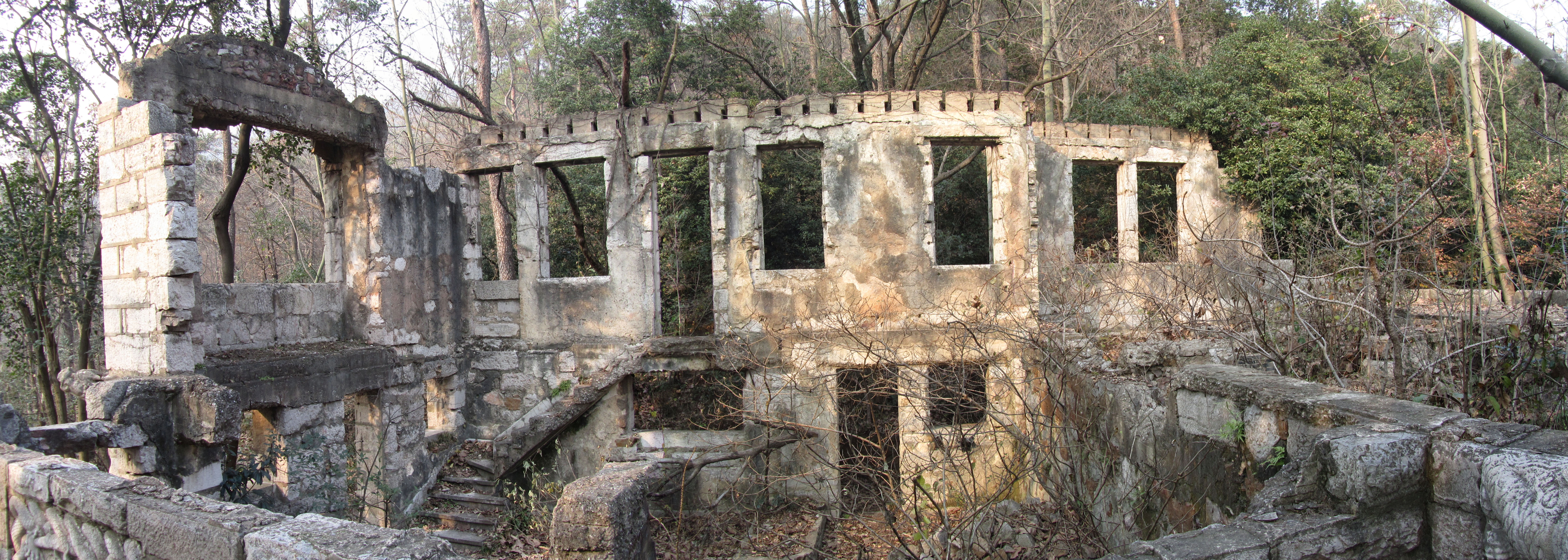 桂林石屋，全景。